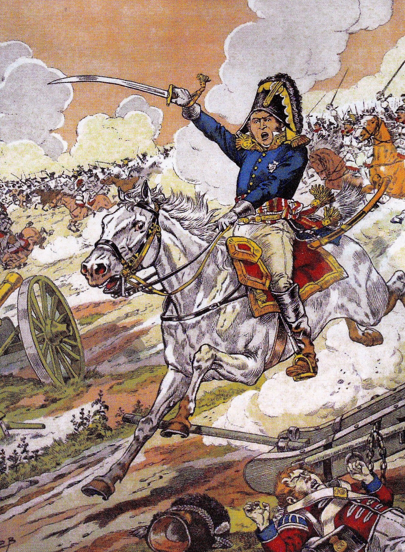 Le général Kellermann à la bataille des Quatre Bras, le 16 juin 1815. Lors de cette bataille, les deux régiments de cuirassiers français de Kellermann maltraitent l'infanterie coalisée et s'emparent un instant du carrefour des Quatre Bras, avant d'en être repoussés par les Britanniques.